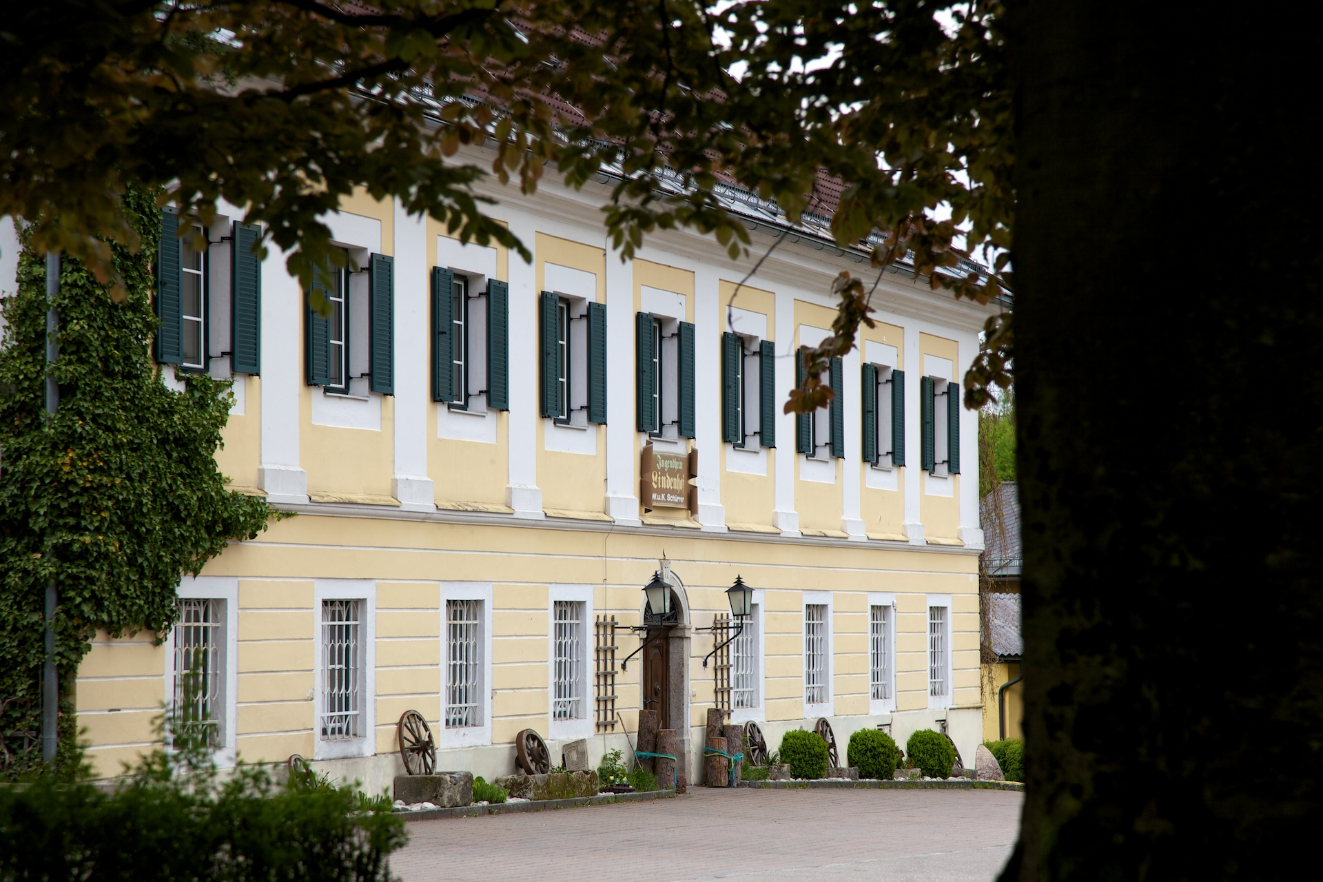 Neues Herrenhaus in Spital am Pyhrn, Schaufassade. Architekt: Franz Höbarth, 1831